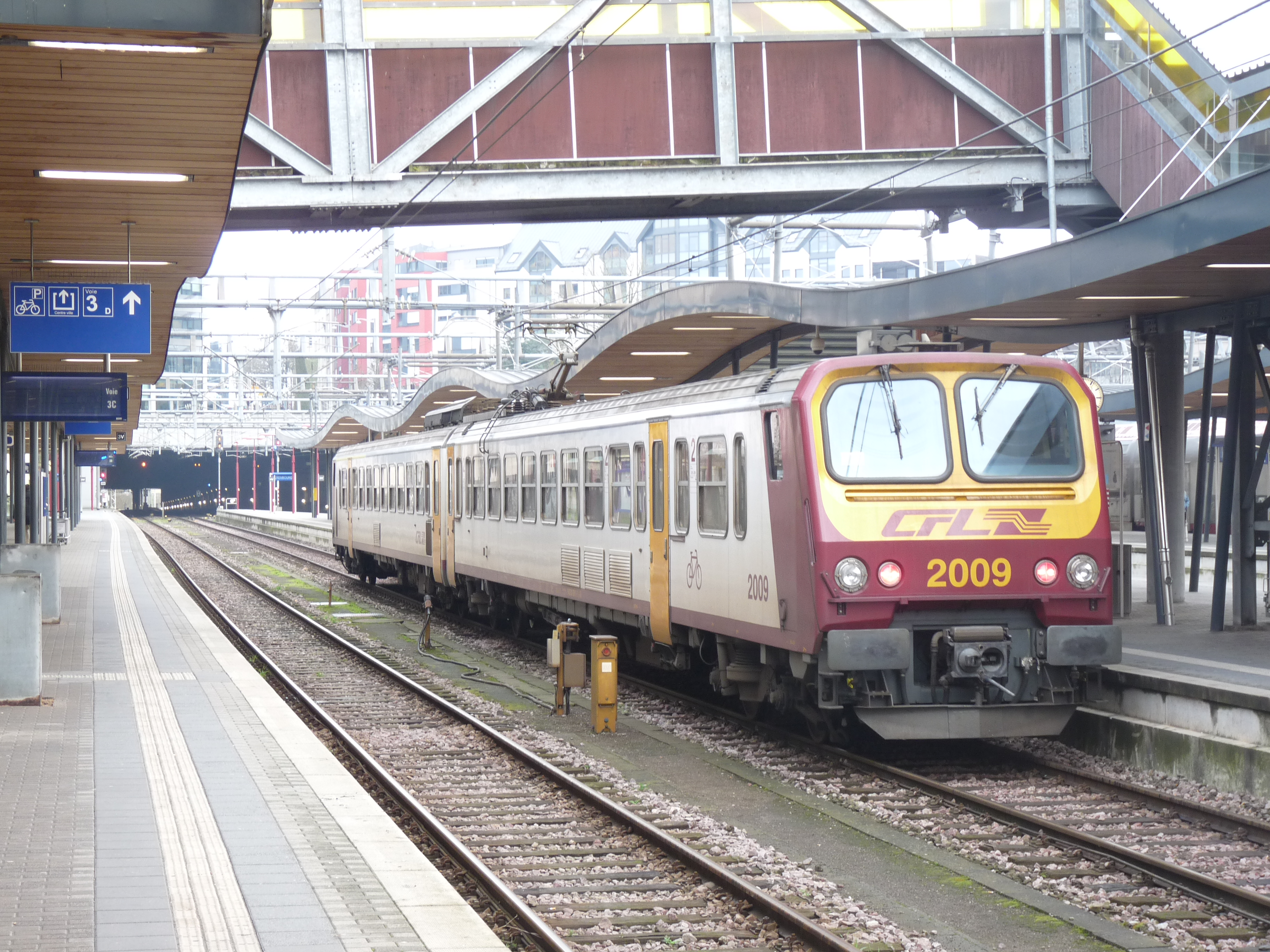 Luxemburg station in januari 2018